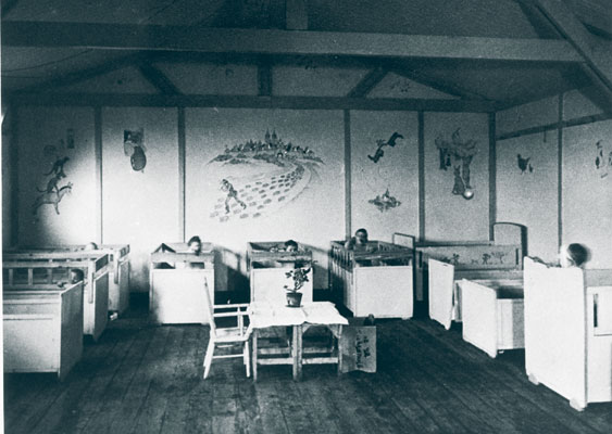 In barak 35 van kamp Westerbork was een zaal voor zieke kinderen ingericht. In opdracht van commandant Gemmeker had de bekende tekenaar Jo Spier de wanden van illustraties voorzien, waaronder De rattenvanger van Hamelen’'. Fotograaf onbekend, collectie NIOD, Amsterdam